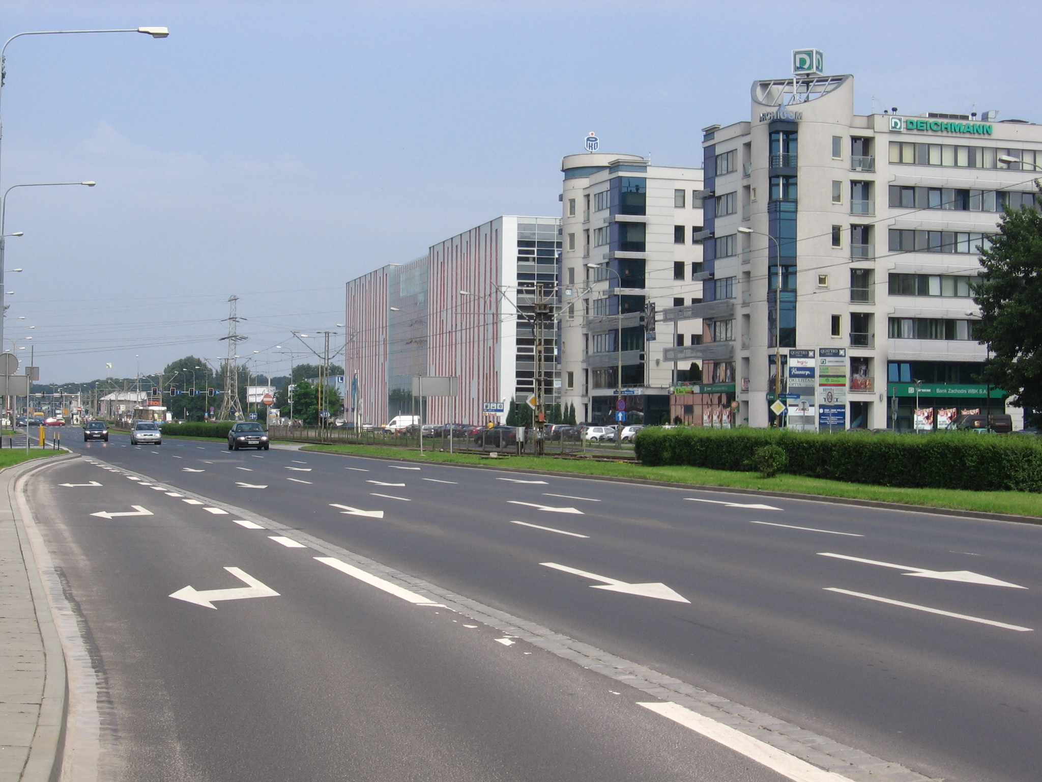 ulica Legnicka we Wrocławiu, odcinek od okolicy skrzyżowania z Niedźwiedzią na północny zachód